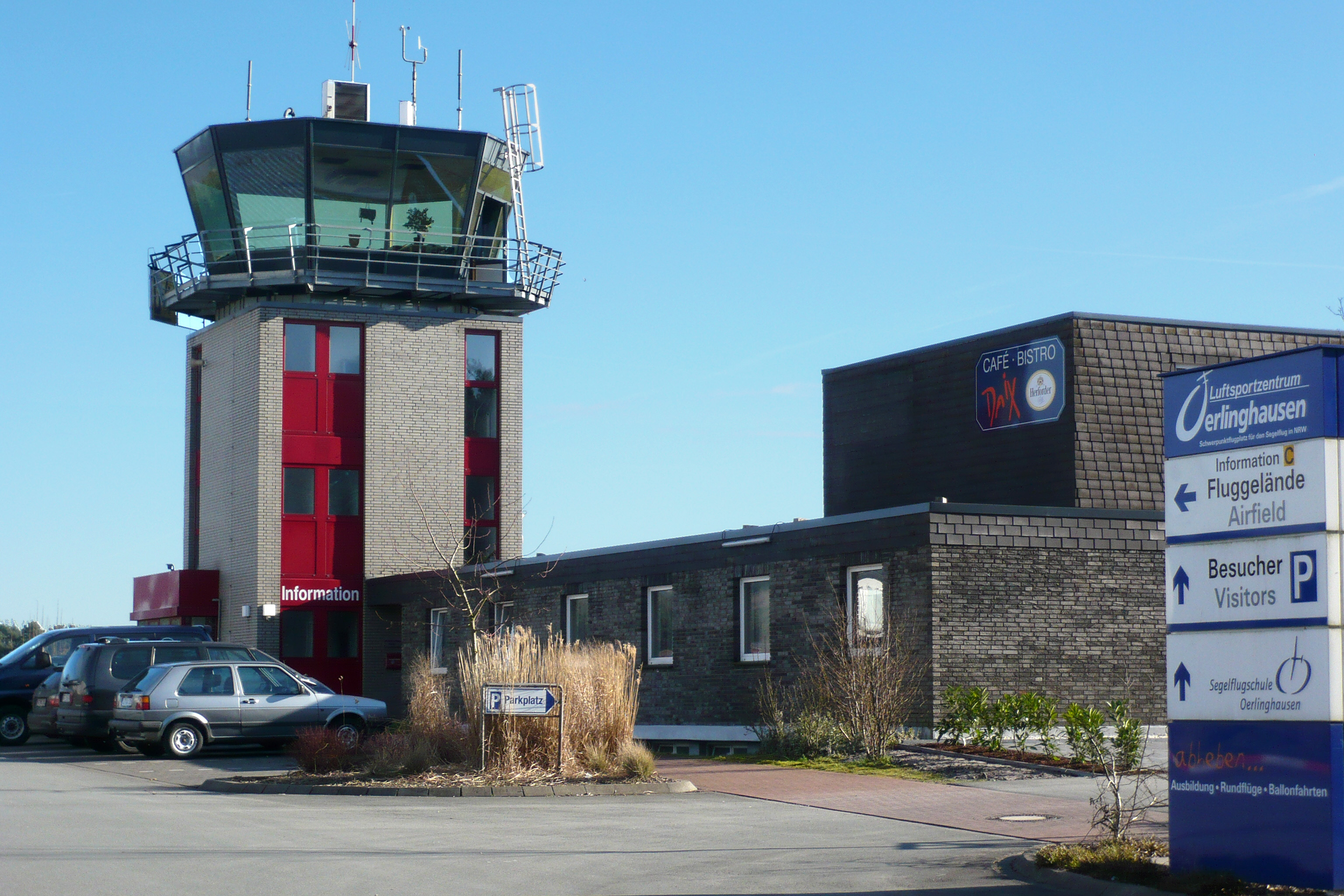 Tower in Oerlinghausen, Germany